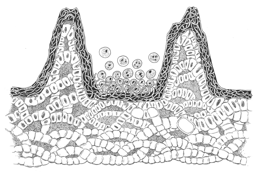 Reconstrucción artística de una sección del talo del líquen Winfrenatia reticulata identificado a partir de sus restos fósiles de Rhynie Chert. Se muestran los tres biontes presentes en la simbiosis.así como las estructura verticales que limitaban las depresiones en las que se encontraba la cianobacteria cocoidea.